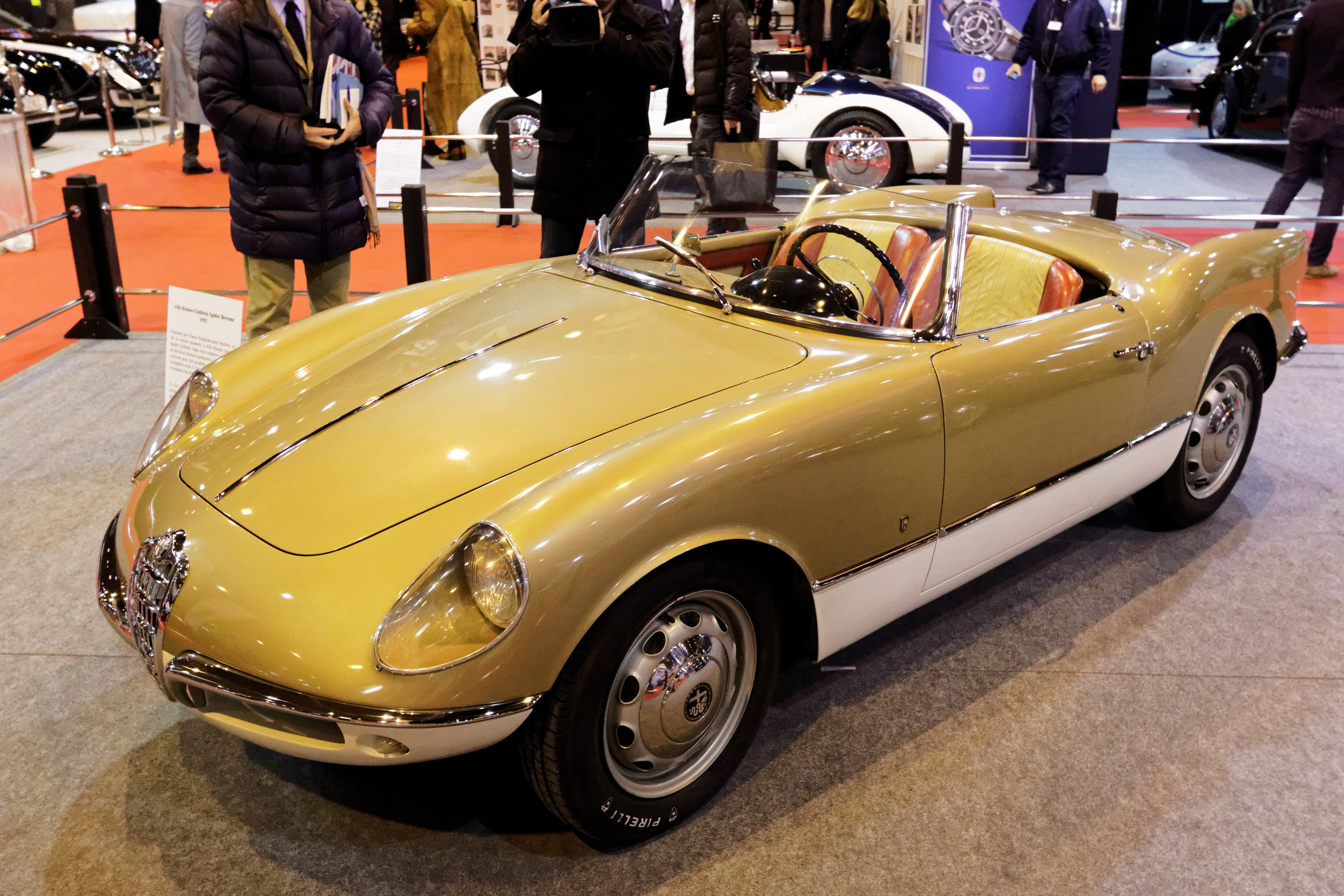 Une des voiture présentée lors du salon Rétromobile de Paris 2015